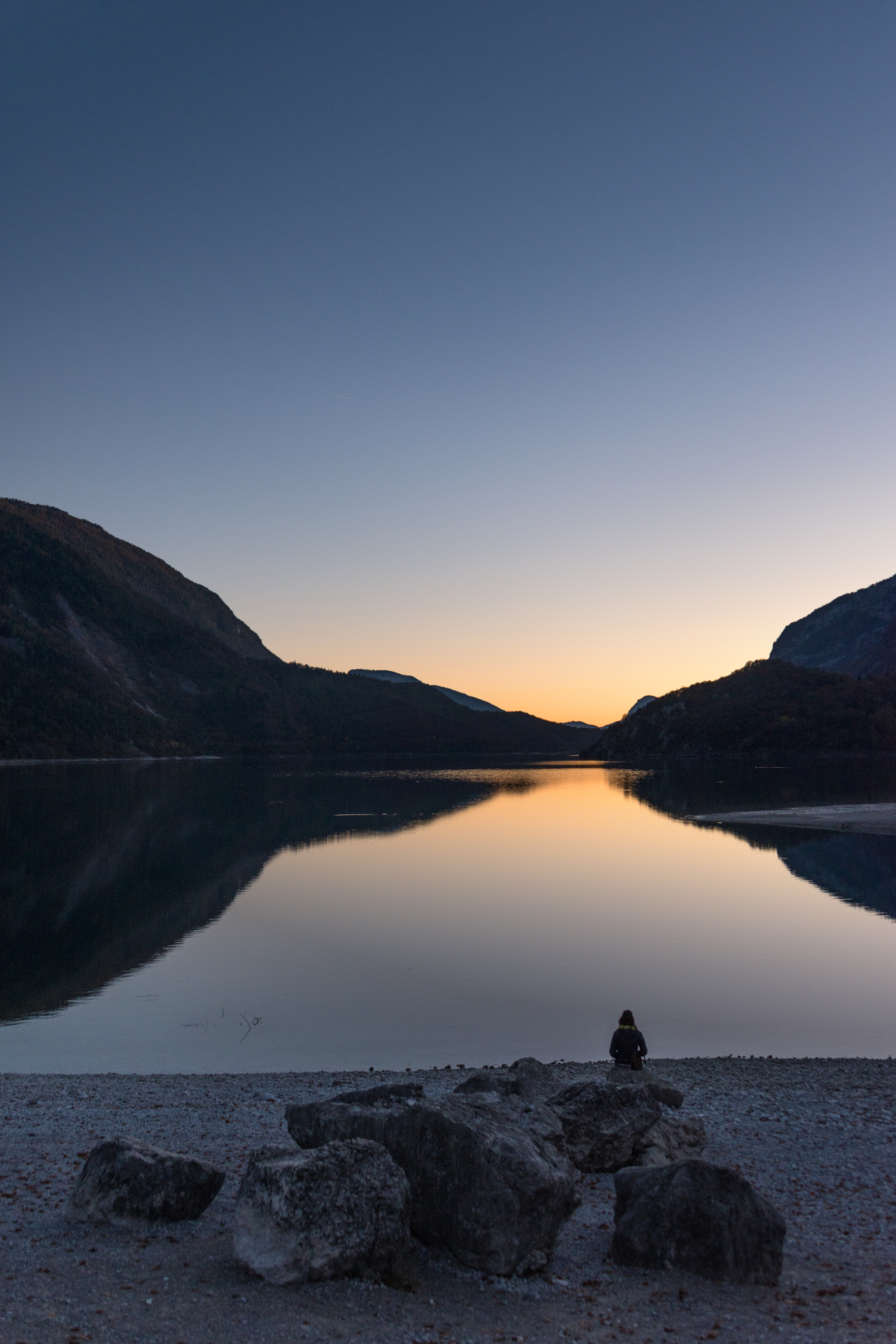 Crepuscolo - Lago di Molveno - Molveno, Trento, Italia